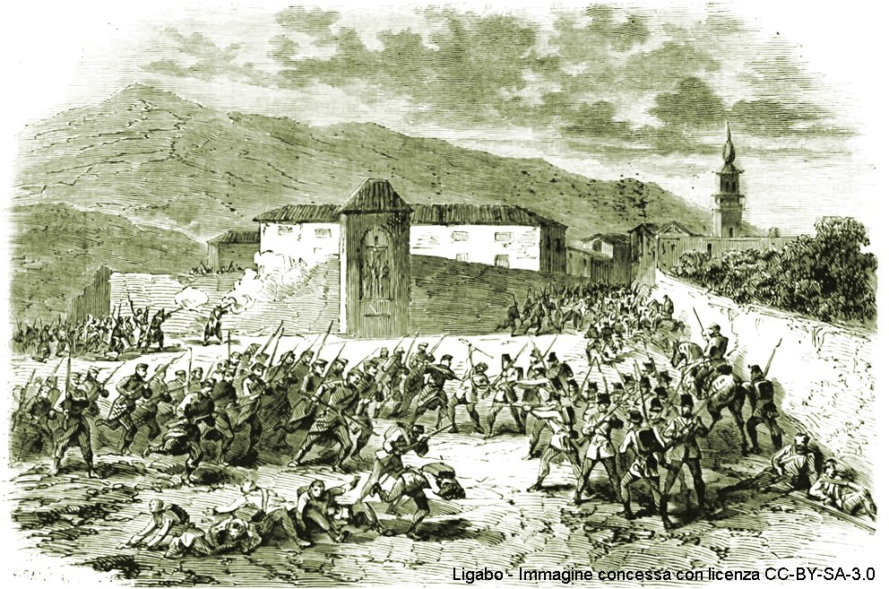 Combattimenti tra gli austriaci del maggiore Carlo Pichler von Deeben e i fanti italiani del generale Medici per il possesso di Levico il 23 luglio 1866